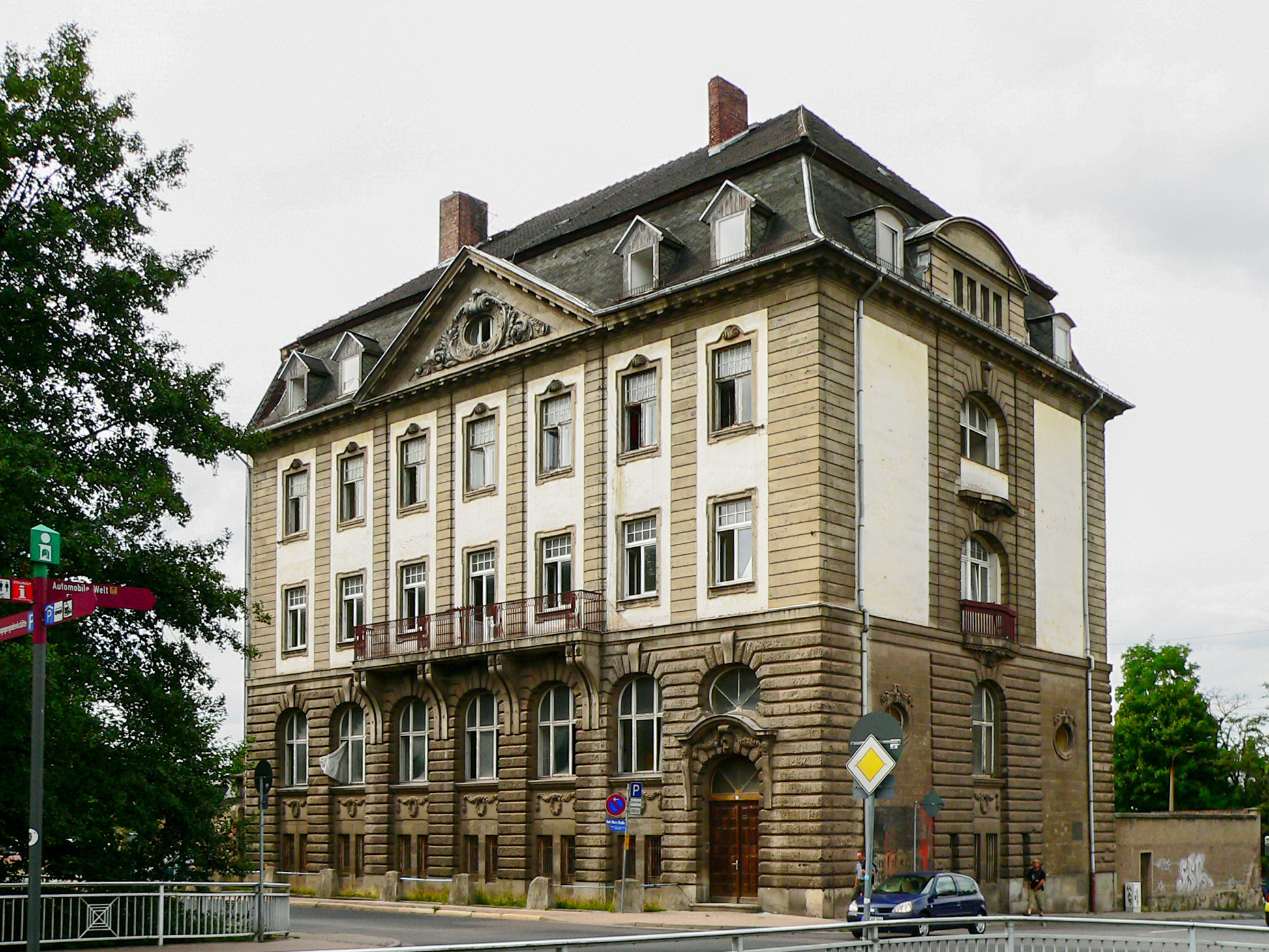 Das ehemalige Bankhaus und in der DDR-Zeit Sitz der SED-Kreisleitung Eisenach.